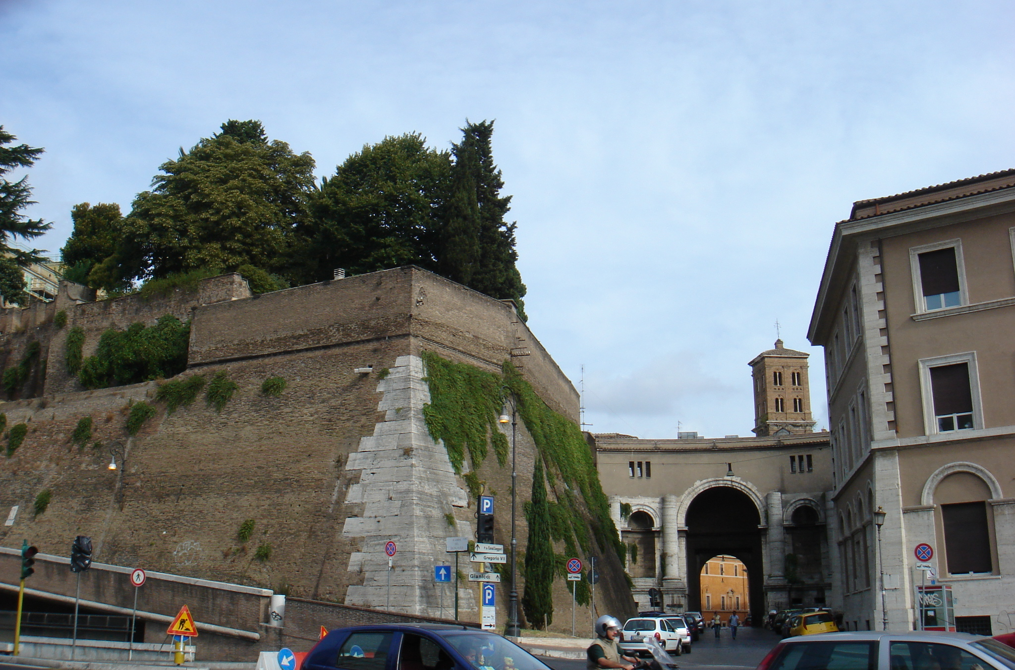 Roma, bastione di Santo Spirito nelle mura vaticane